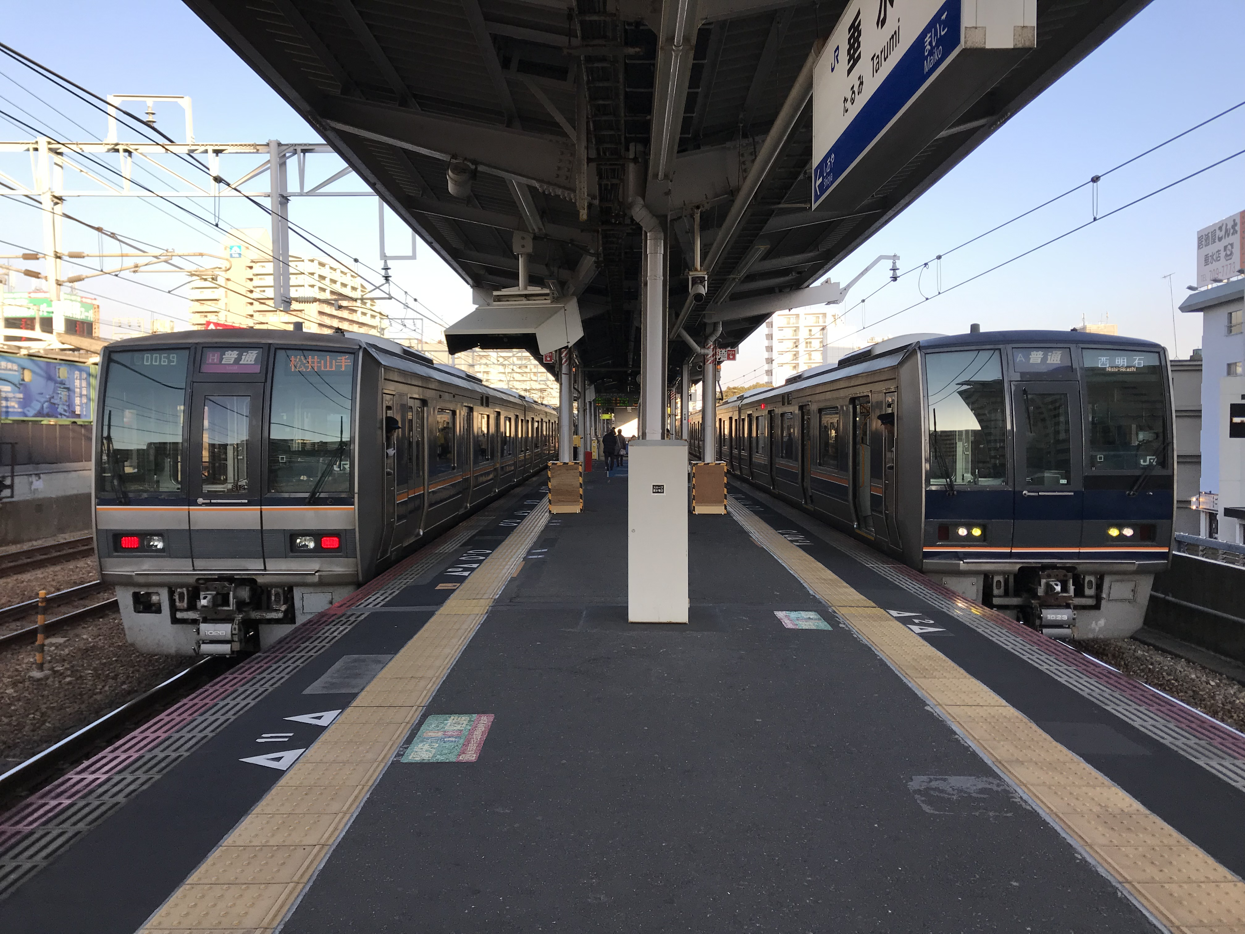 垂水駅のホーム(奥は塩屋方面)。左側は松井山手行き、右側は西明石行き普通列車